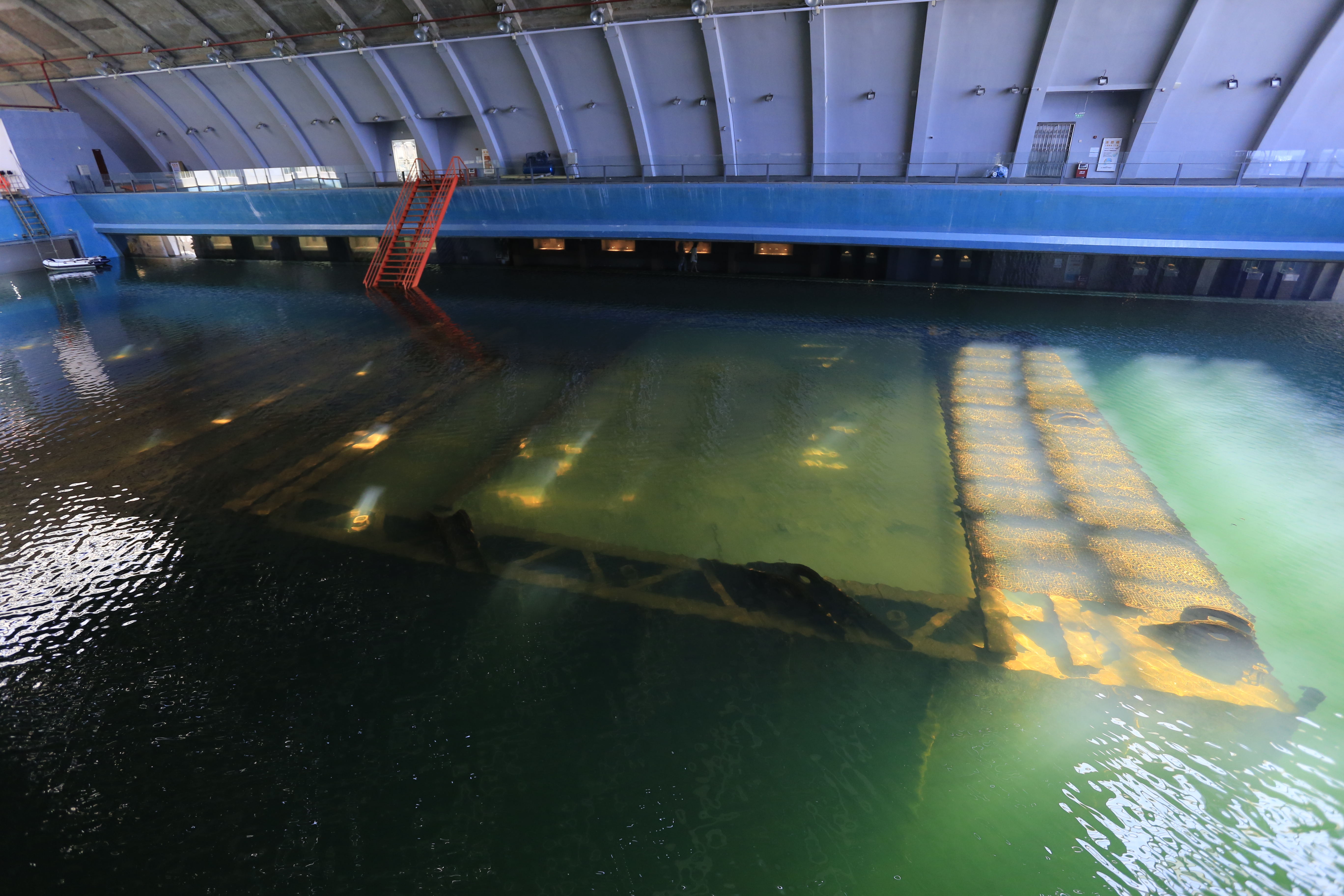 阳江海陵岛“南海一号”